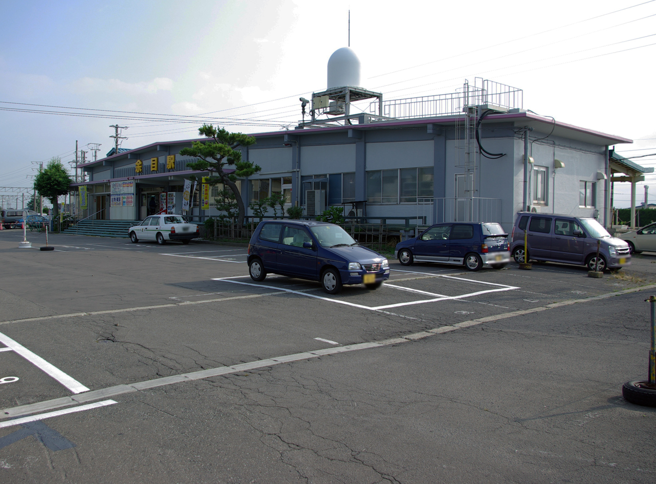 JR羽越本線余目駅